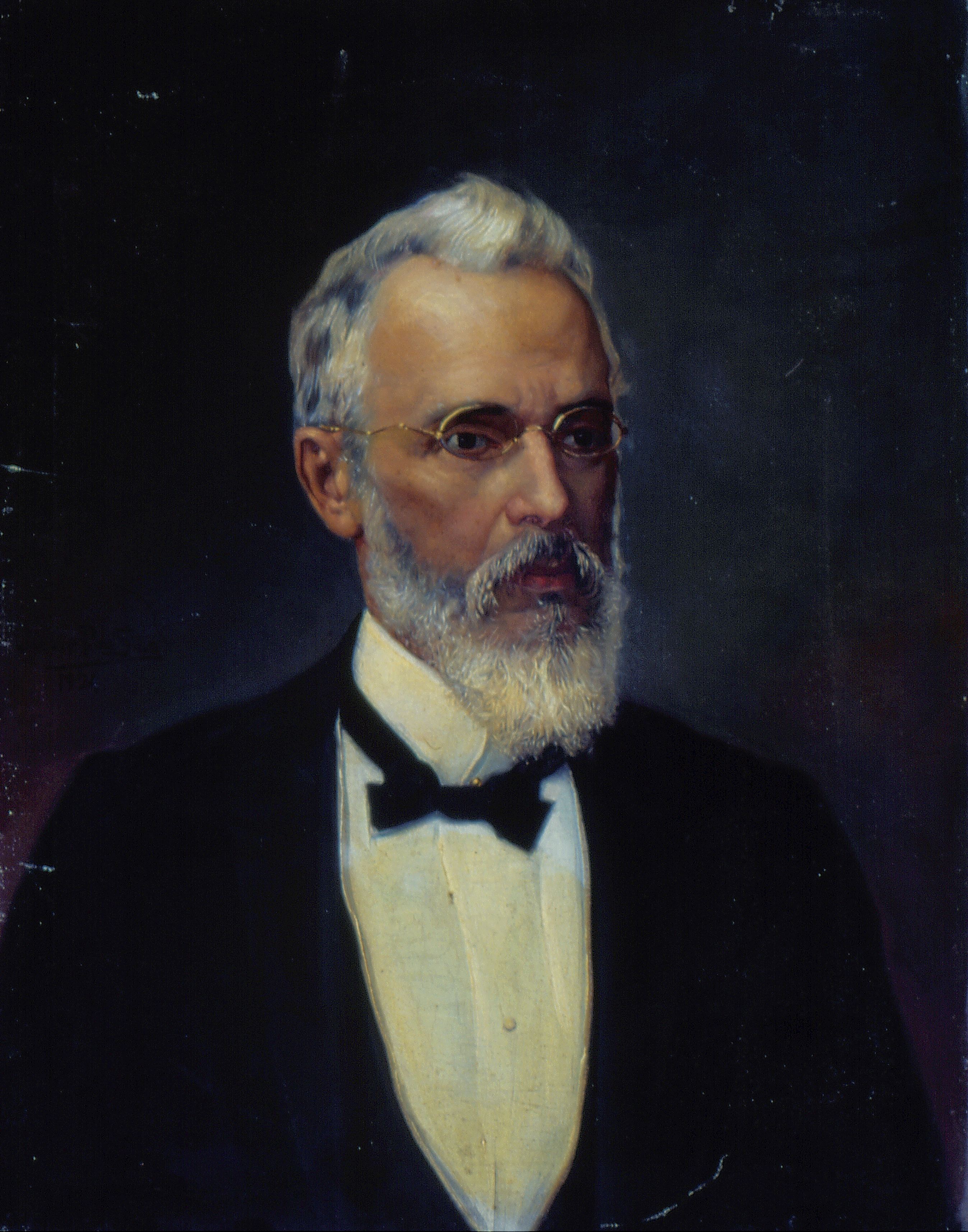 Obra que integra o acervo do Museu Paulista da USP. Coleção Fundo Museu Paulista - FMP